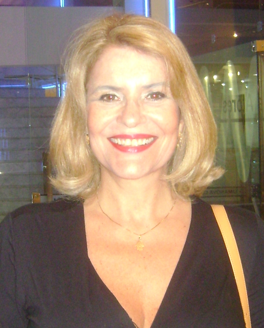 Sílvia Bandeira, atriz brasileira, após a apresentação da peça "Marlene Dietrich - As Pernas do Século", em São Paulo.